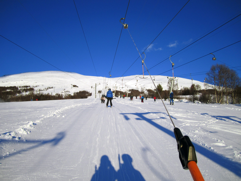 Oppdal skisenter